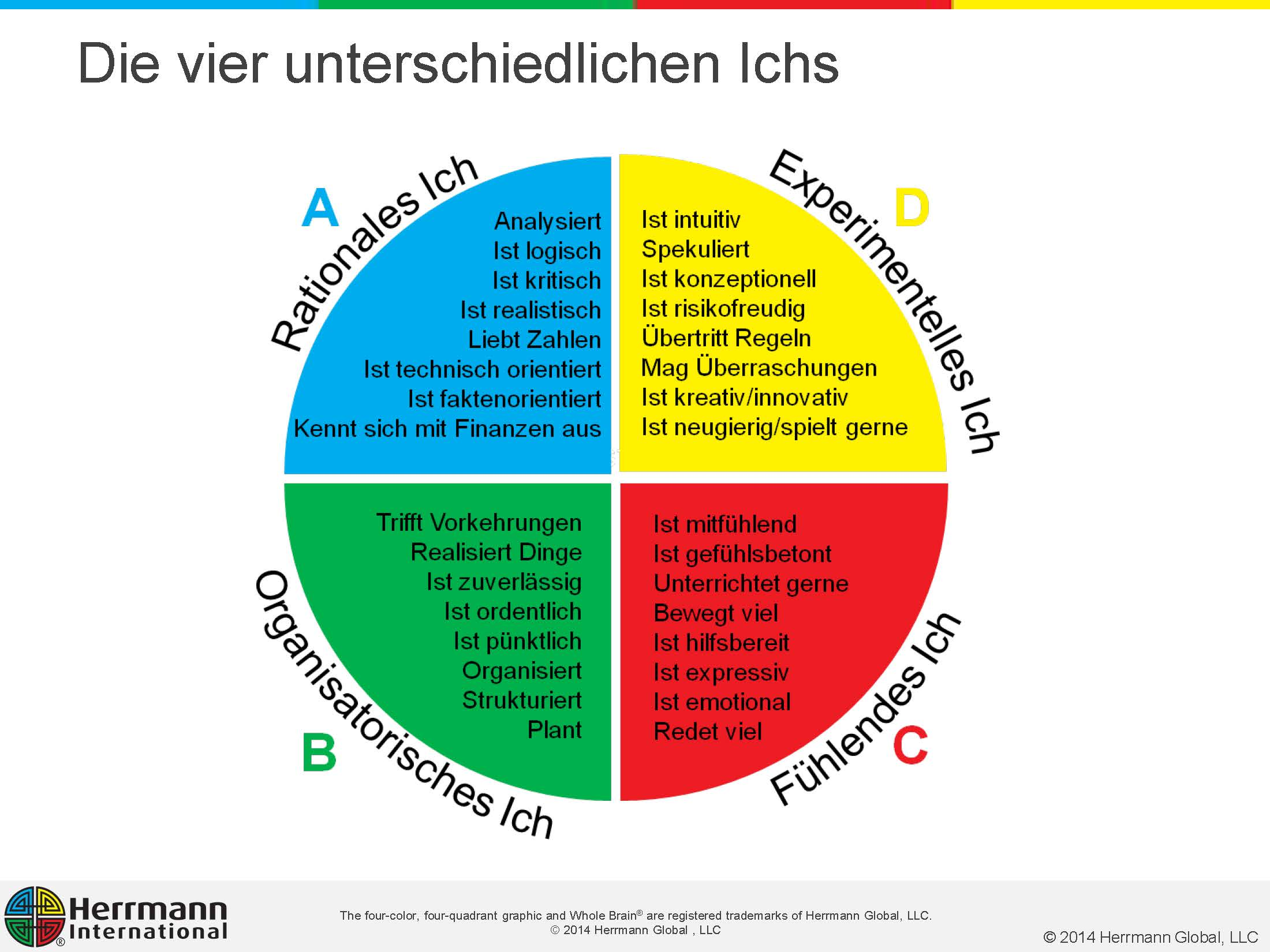 Die vier Ichs des HBDI-Modells